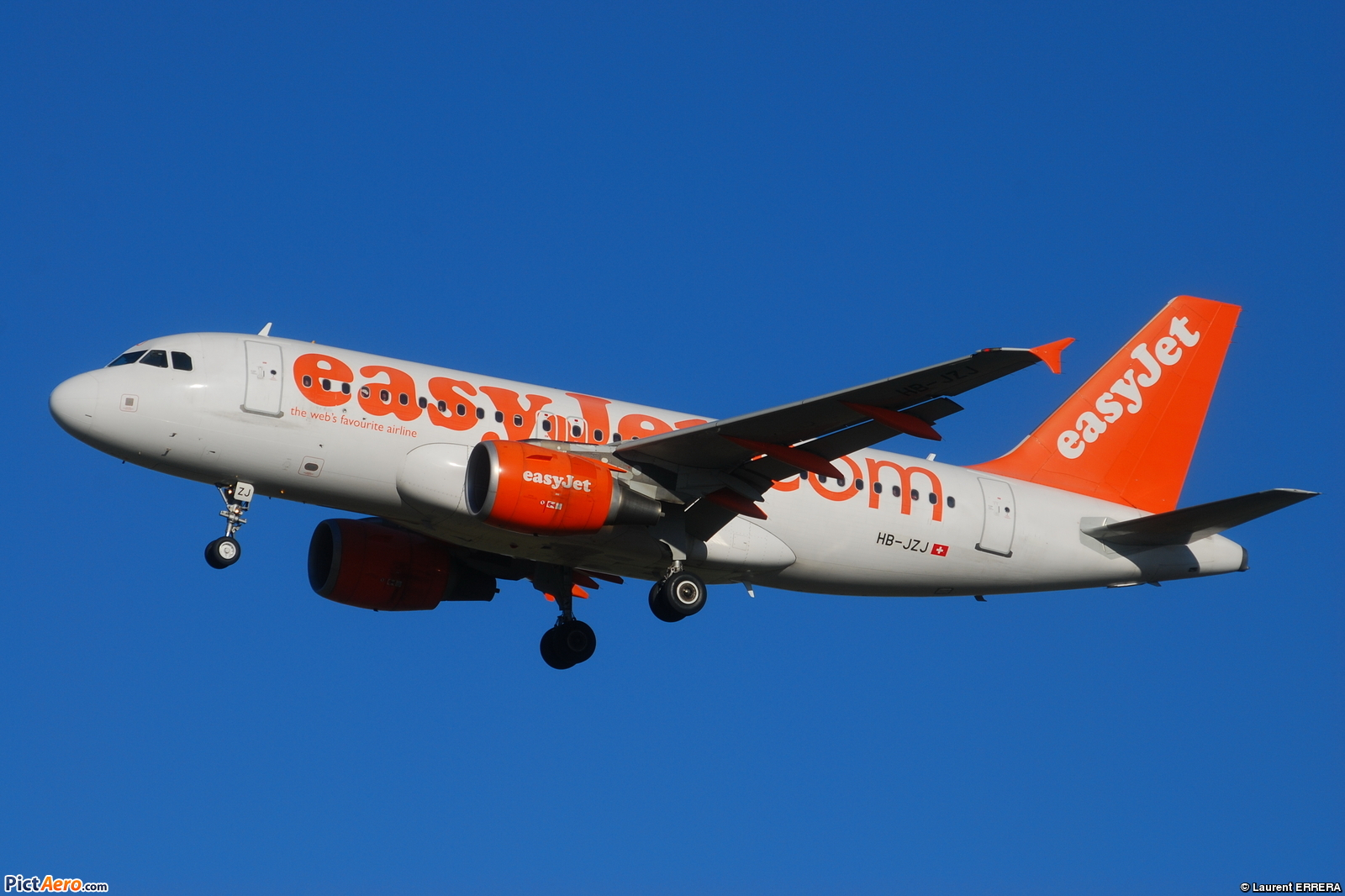 Photo prise à l'aéroport de Toulouse-Blagnac (LFBO) en France. Picture take at Toulouse-Blagnac Airport (LFBO) in France.